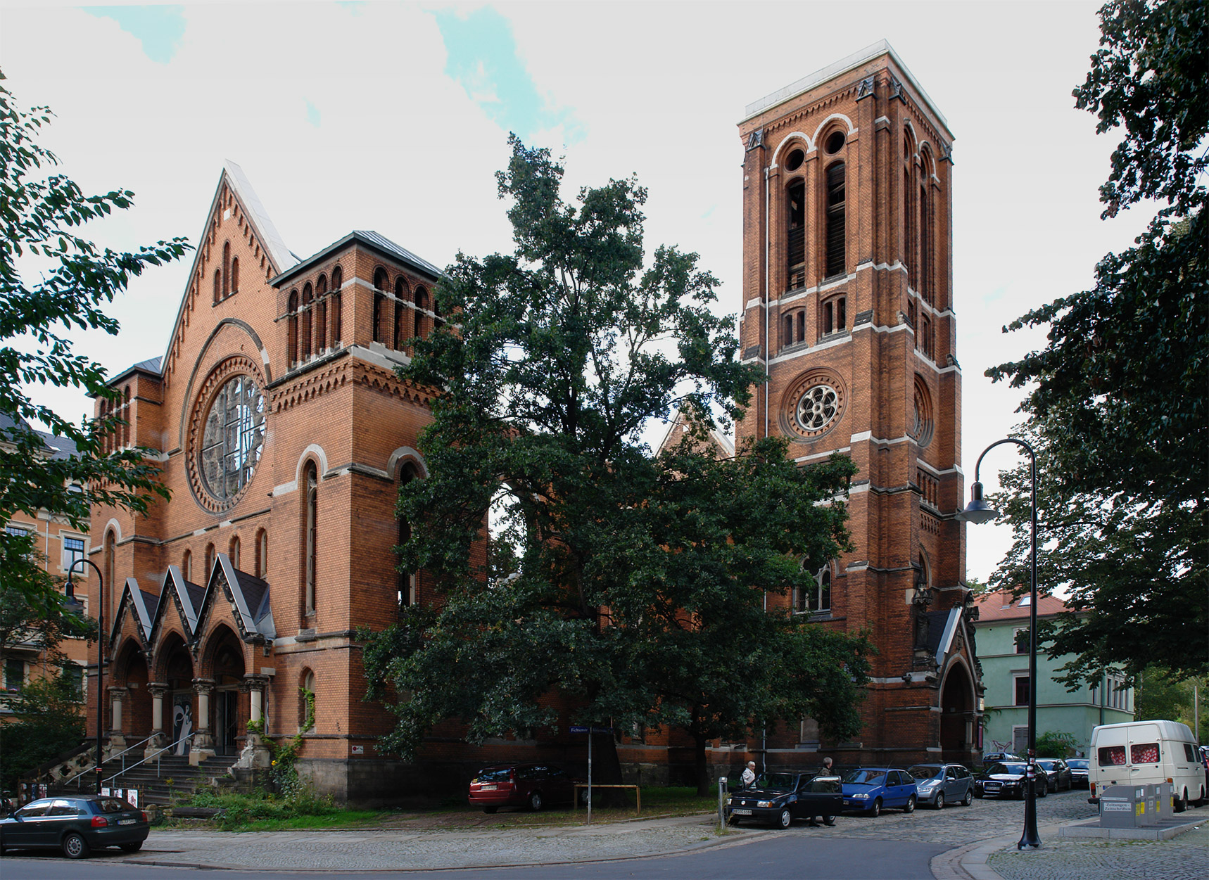 St.-Pauli-Ruine in Dresden: Ruine der St.-Pauli-Kirche, heute als Freiluft-Theater genutzt